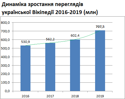 Відвідуваність української Вікіпедії 2016- 2019